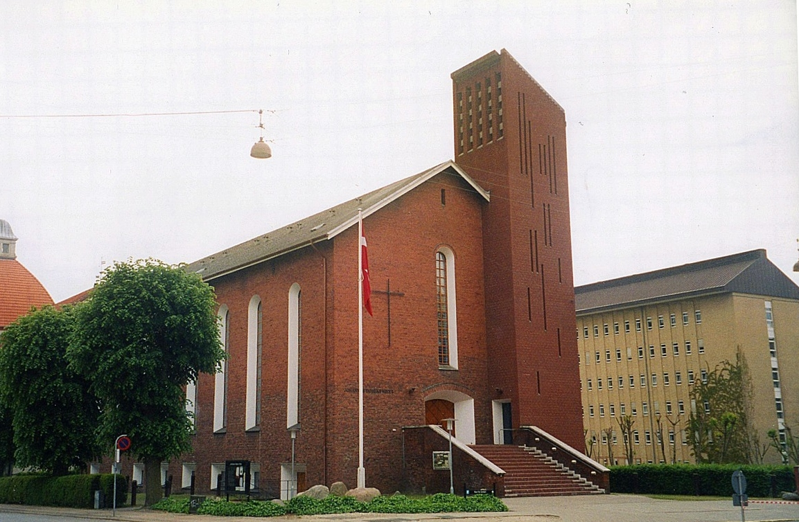 Johannes Døbers Kirke